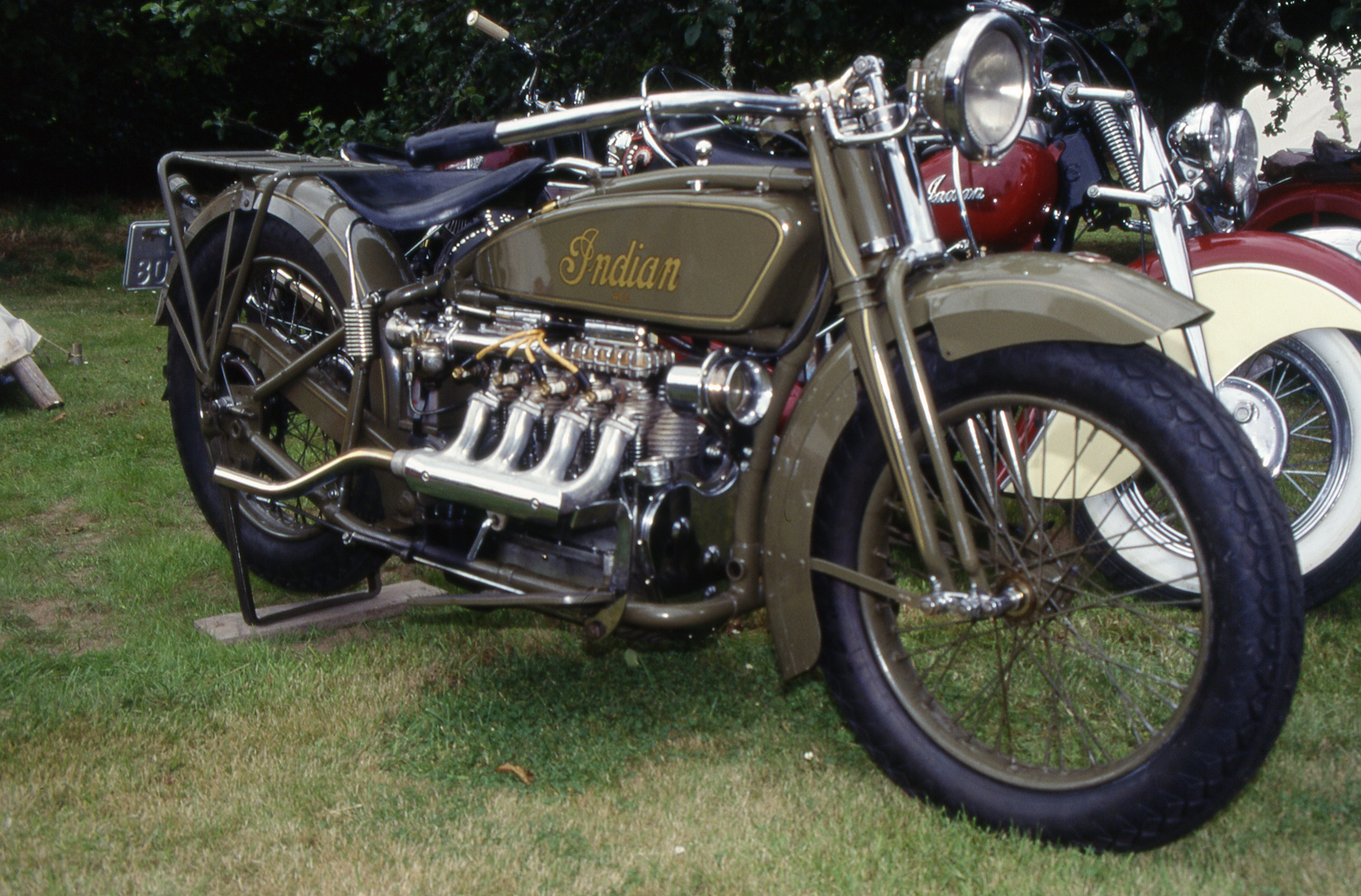 Indian Ace 1928 4 Zylinder Reihe, wechselgesteuert, 1265 ccm